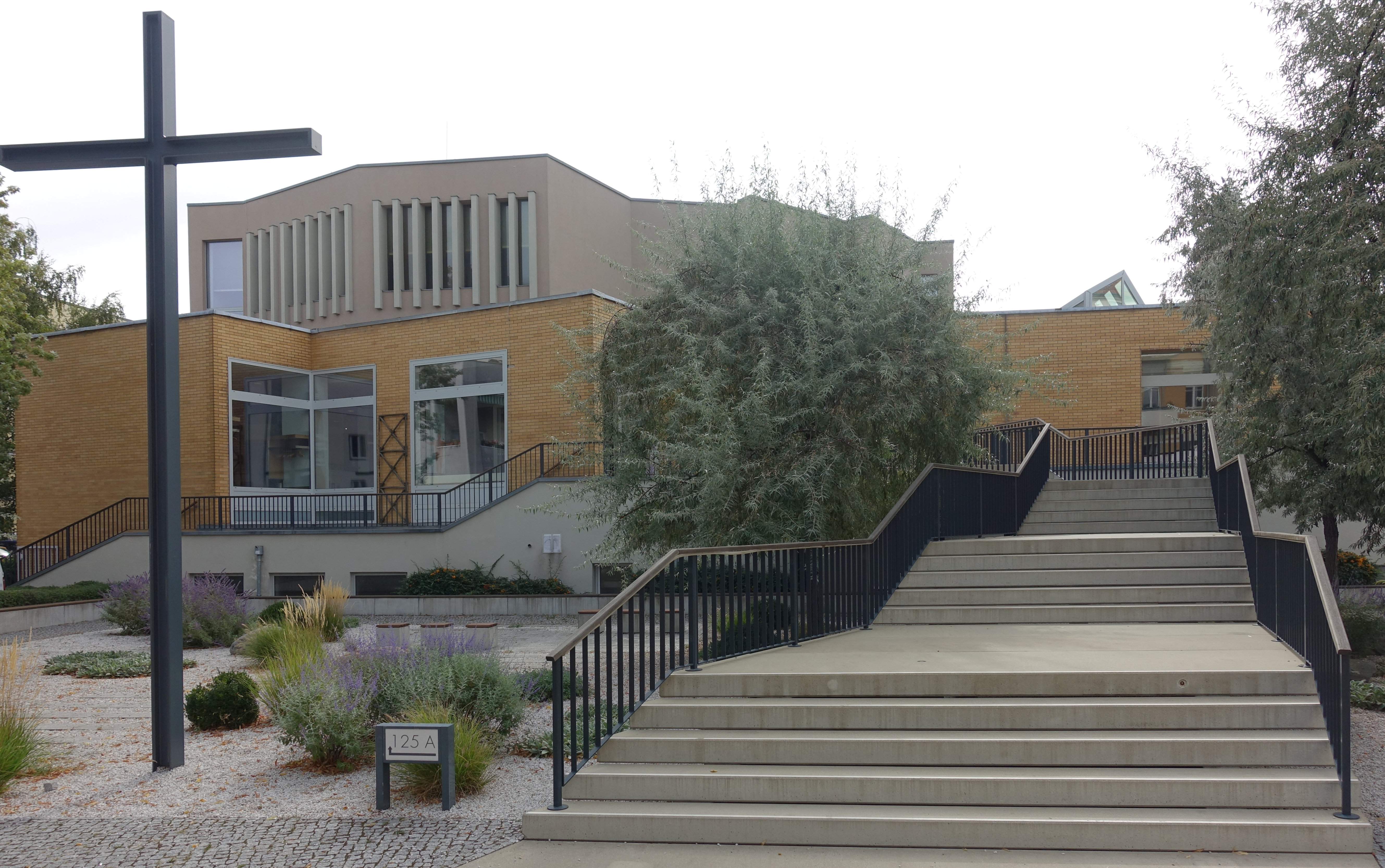 Freitreppe zur Baptistenkirche